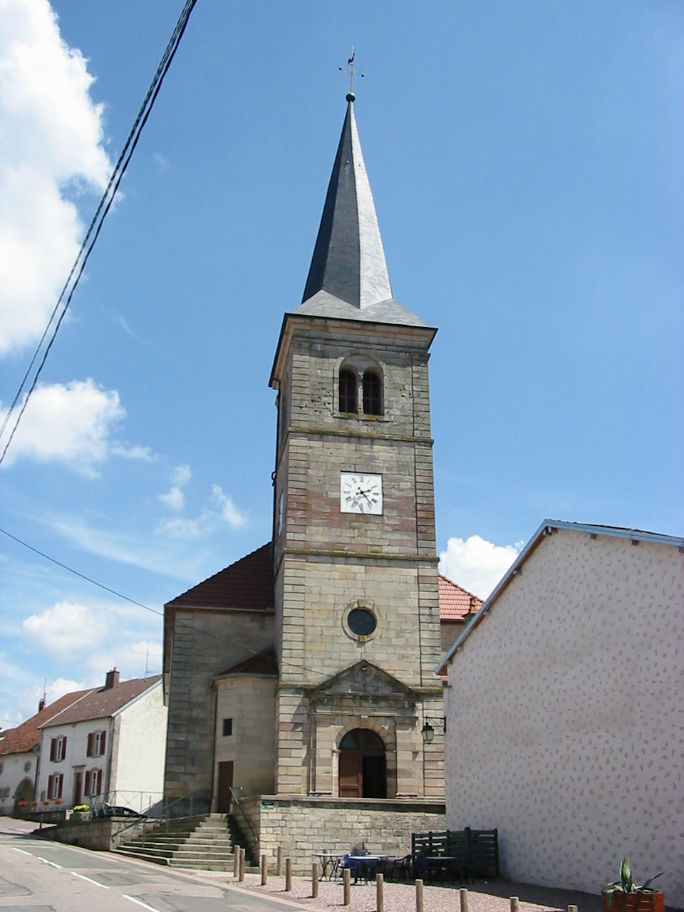 Église Saint-Colomban à Bains-les-Bains, commune des Vosges.